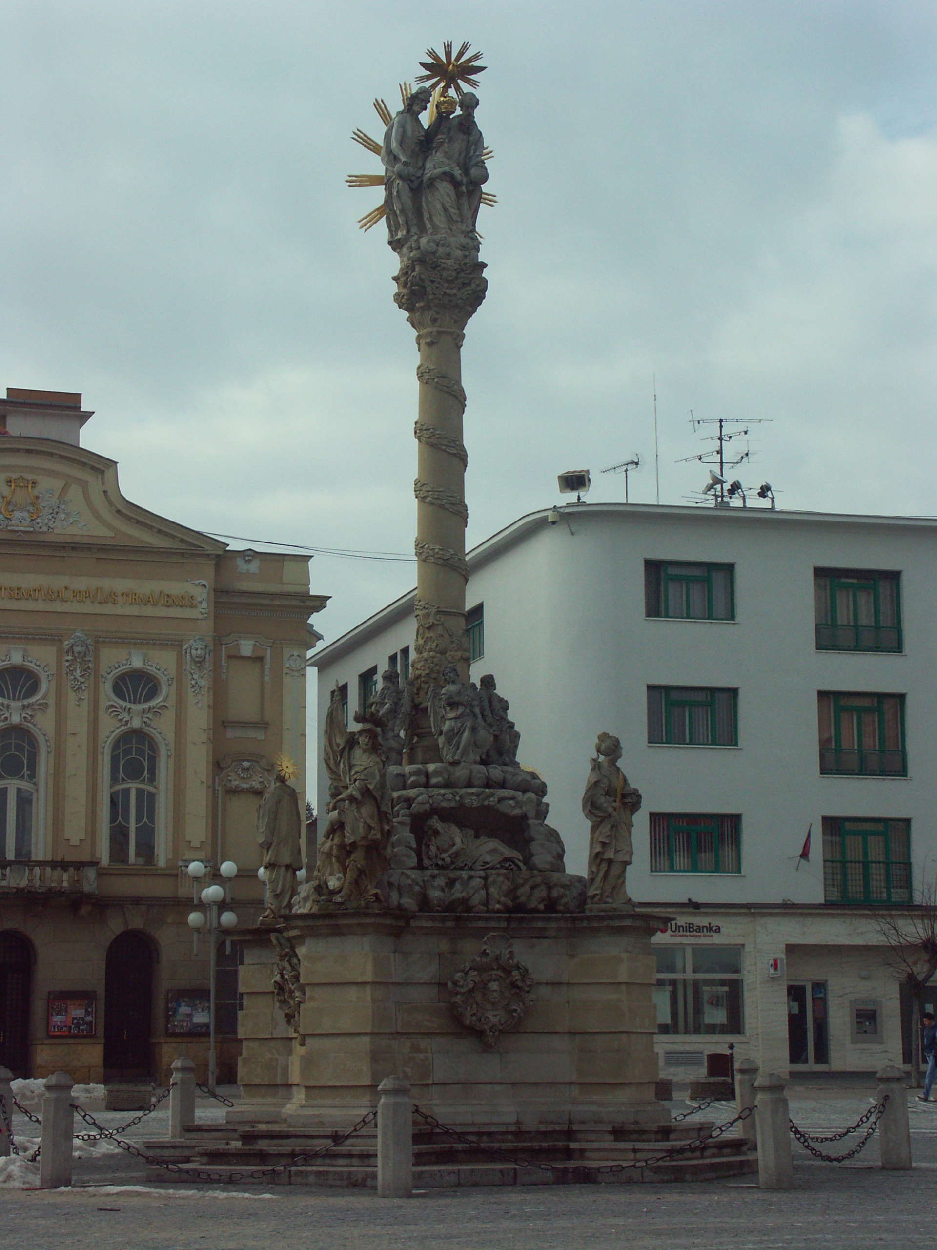 Stĺp Najsv. Trojice na Trojičnom námestí v Trnave